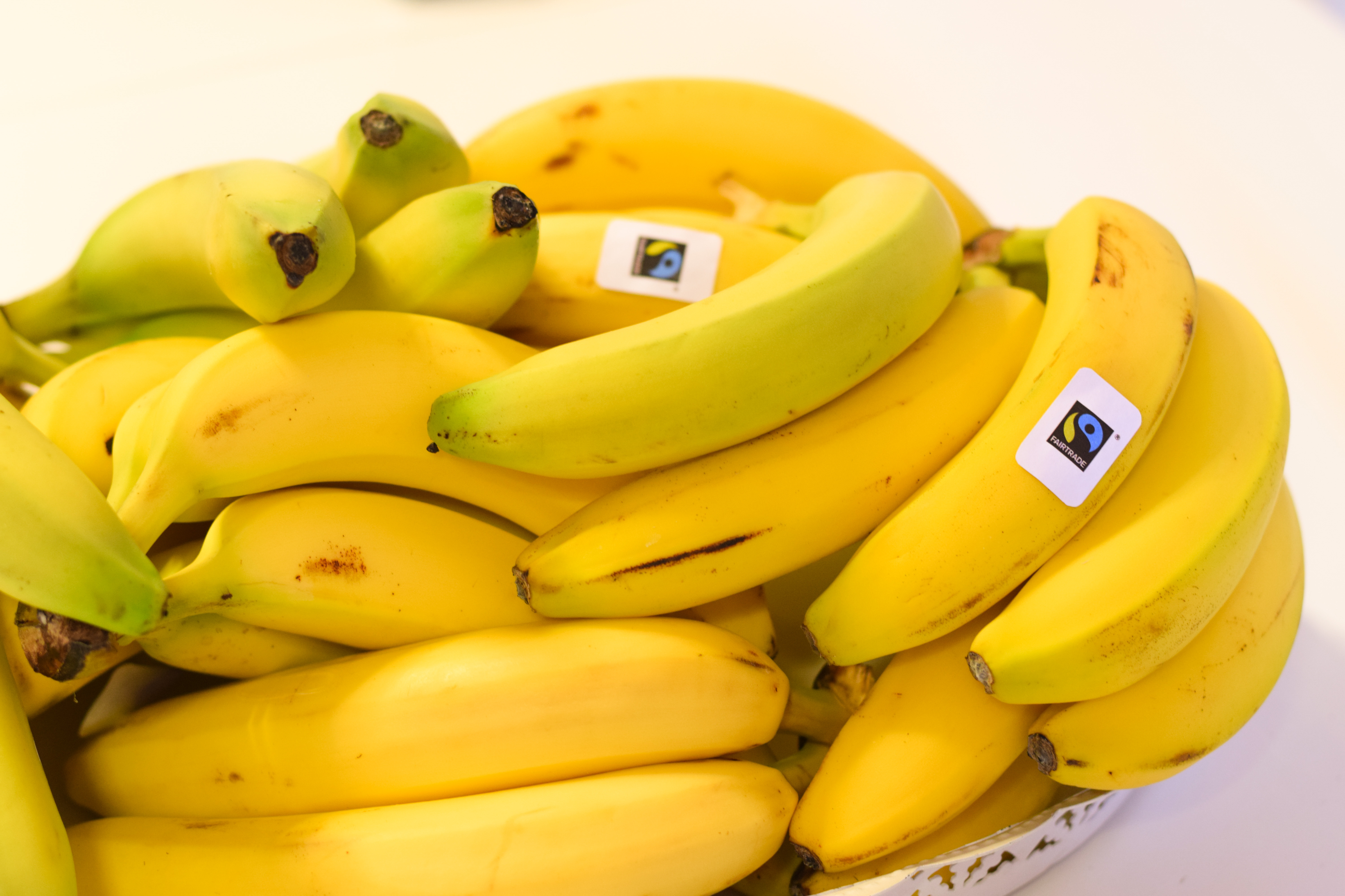 Fairtrade-märkta bananer